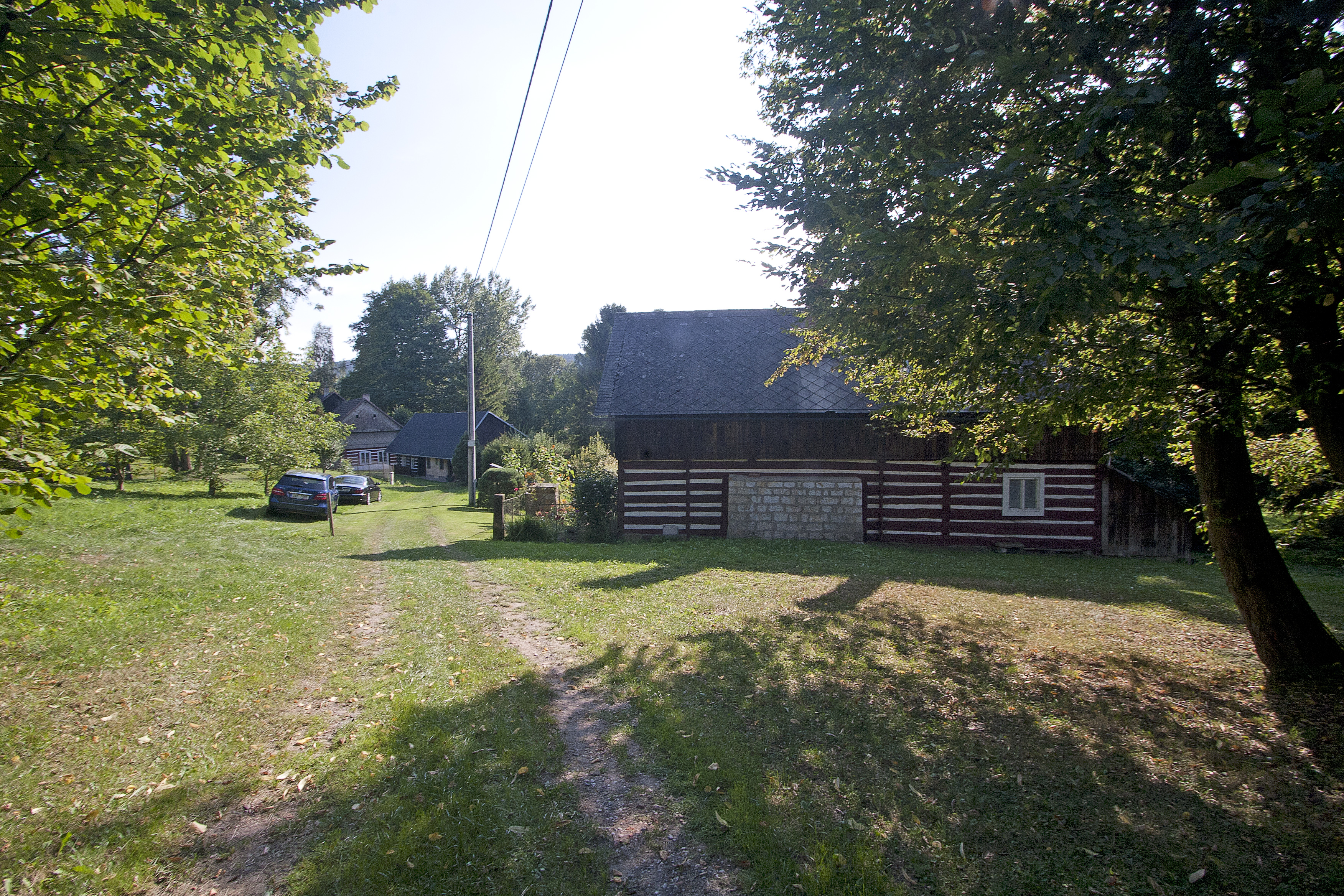 Černín čp. 12